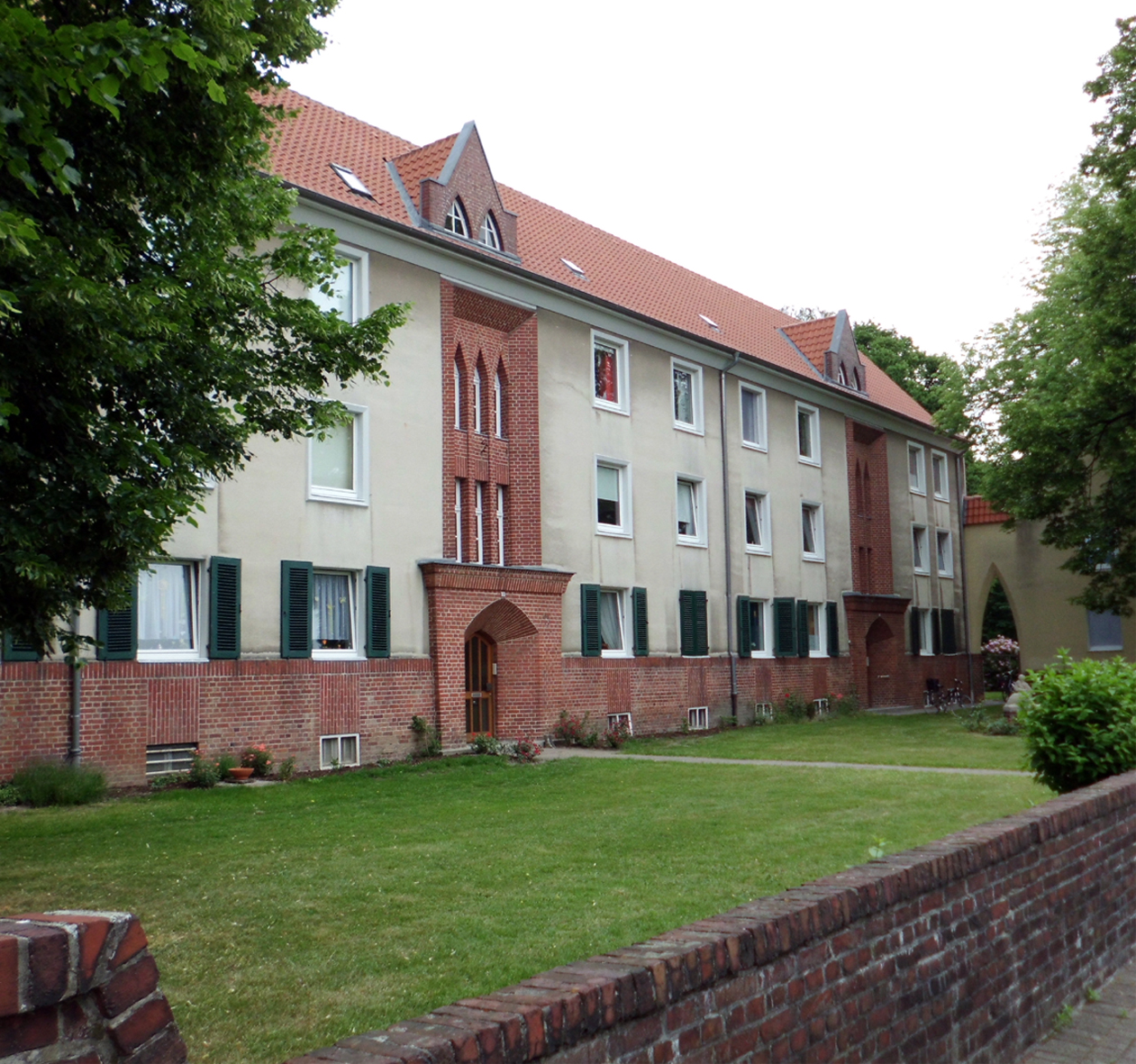 Bielefeld, Denkmalnummer 455, Teilbaugebiet der Freien Scholle von 1925/26 am Heeper Fichten This is a photograph of an architectural monument.